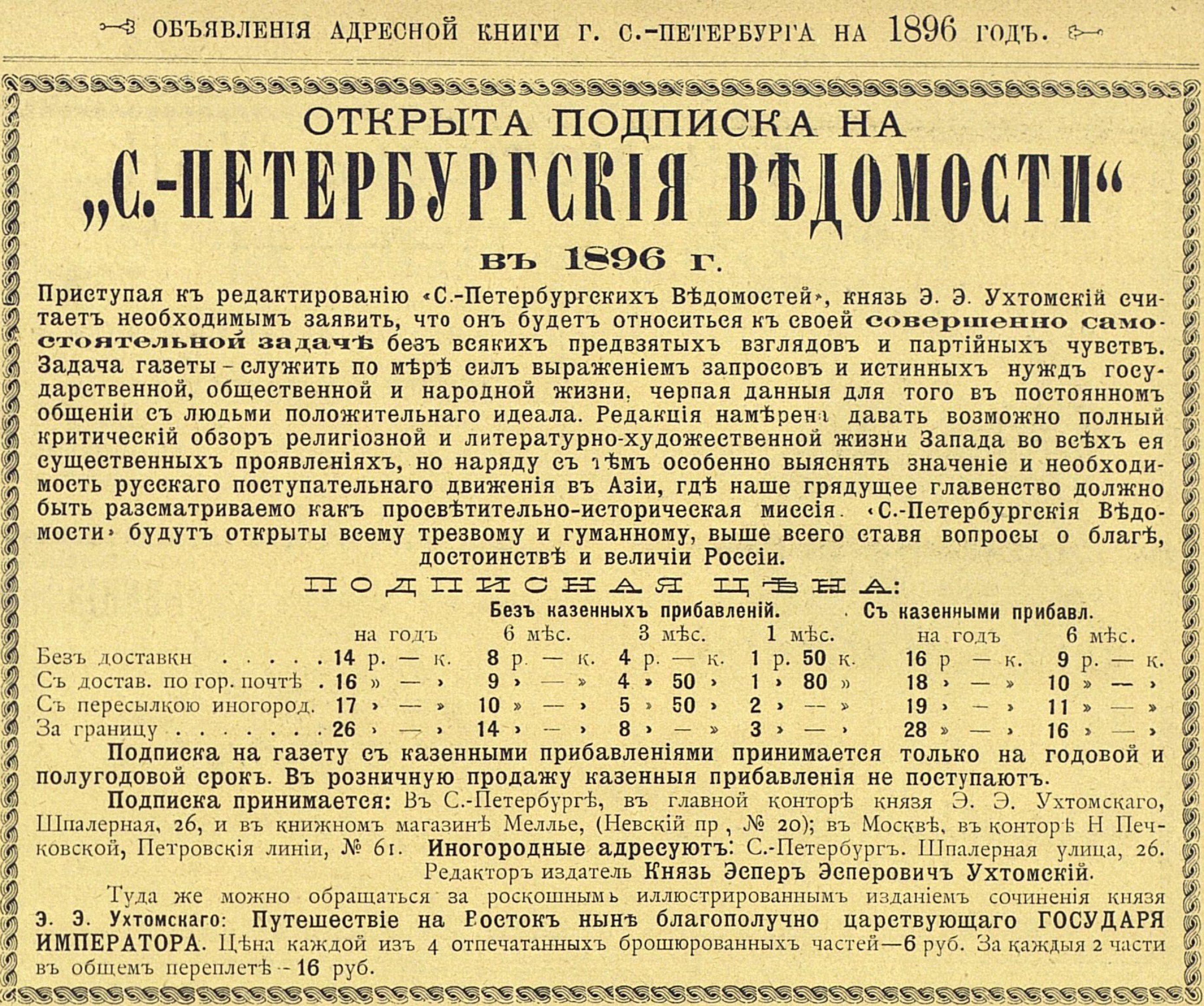 Реклама газеты Санкт-Петербургские ведомости, 1896 год.